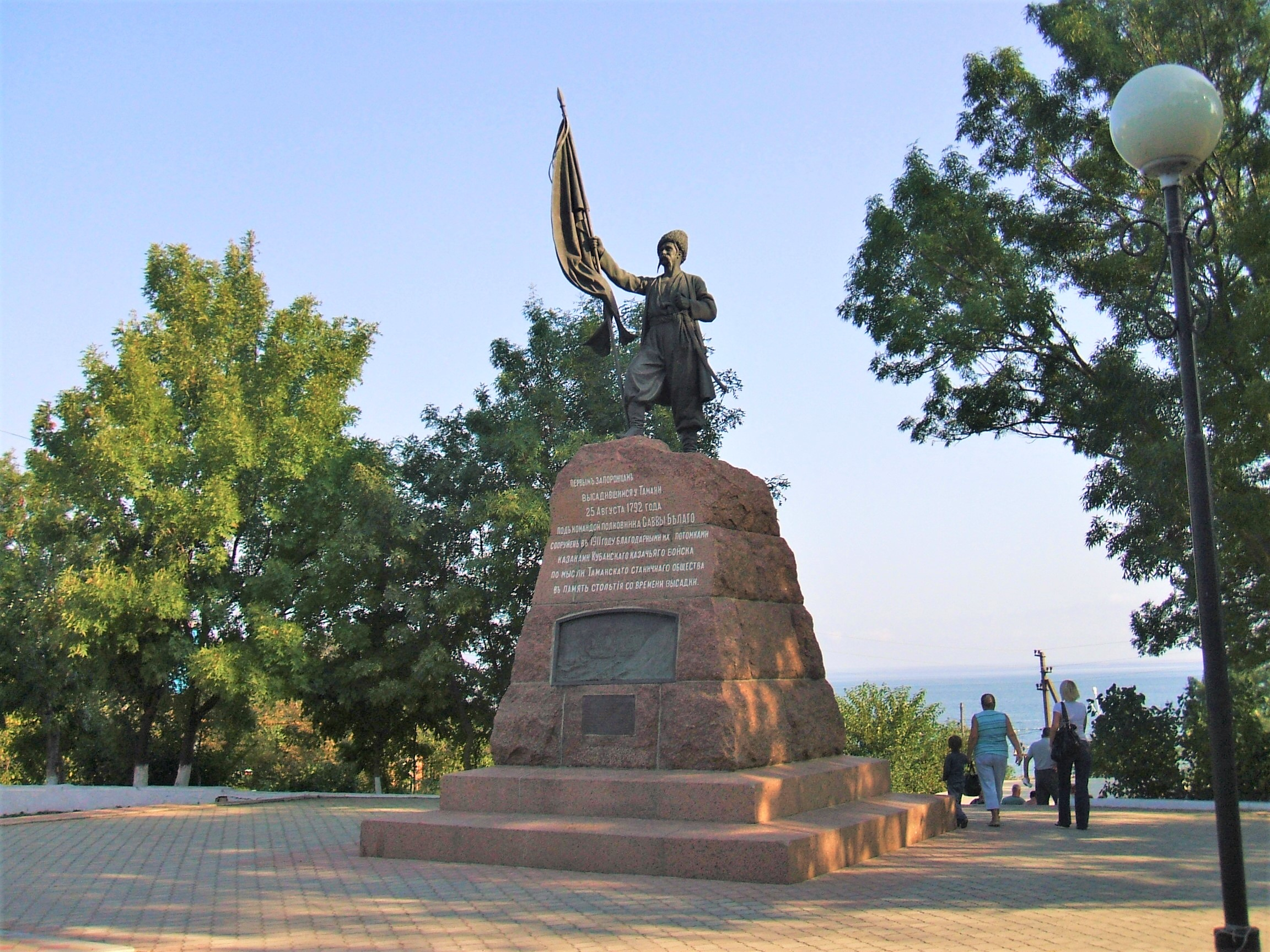 Памятник Таманскому казачеству, установлен в 1911 году